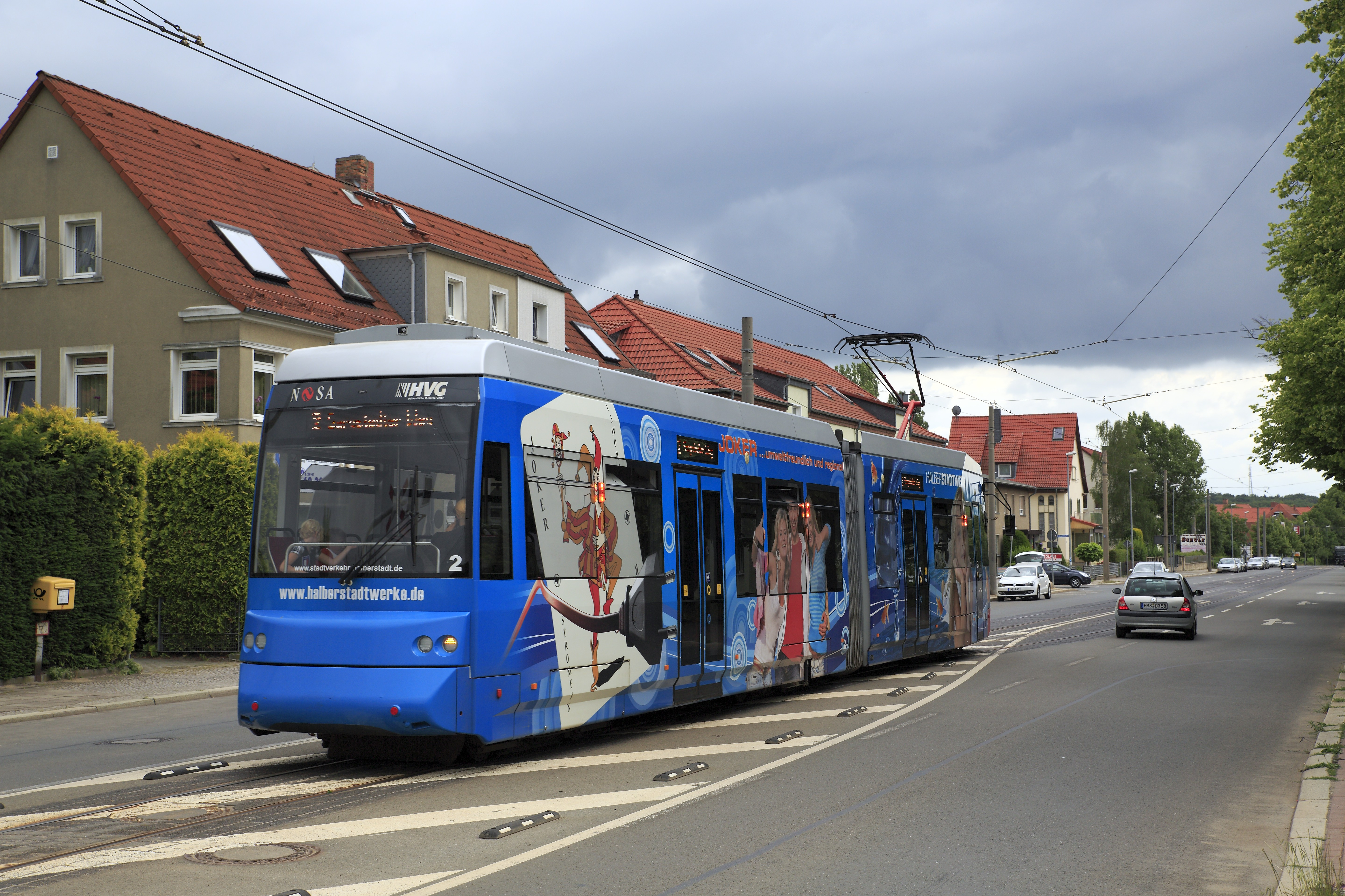 Leoliner, Halberstädter Ausführung mit verkürztem B-Ende. Linie 2 Richtung Sargstedter Straße.